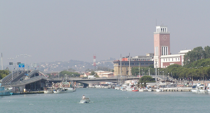 Der Hafen von Pescara